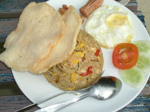 Nasi goreng. ナシゴレン